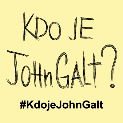 Nálepka "Kdo Je John Galt?" s hashtag